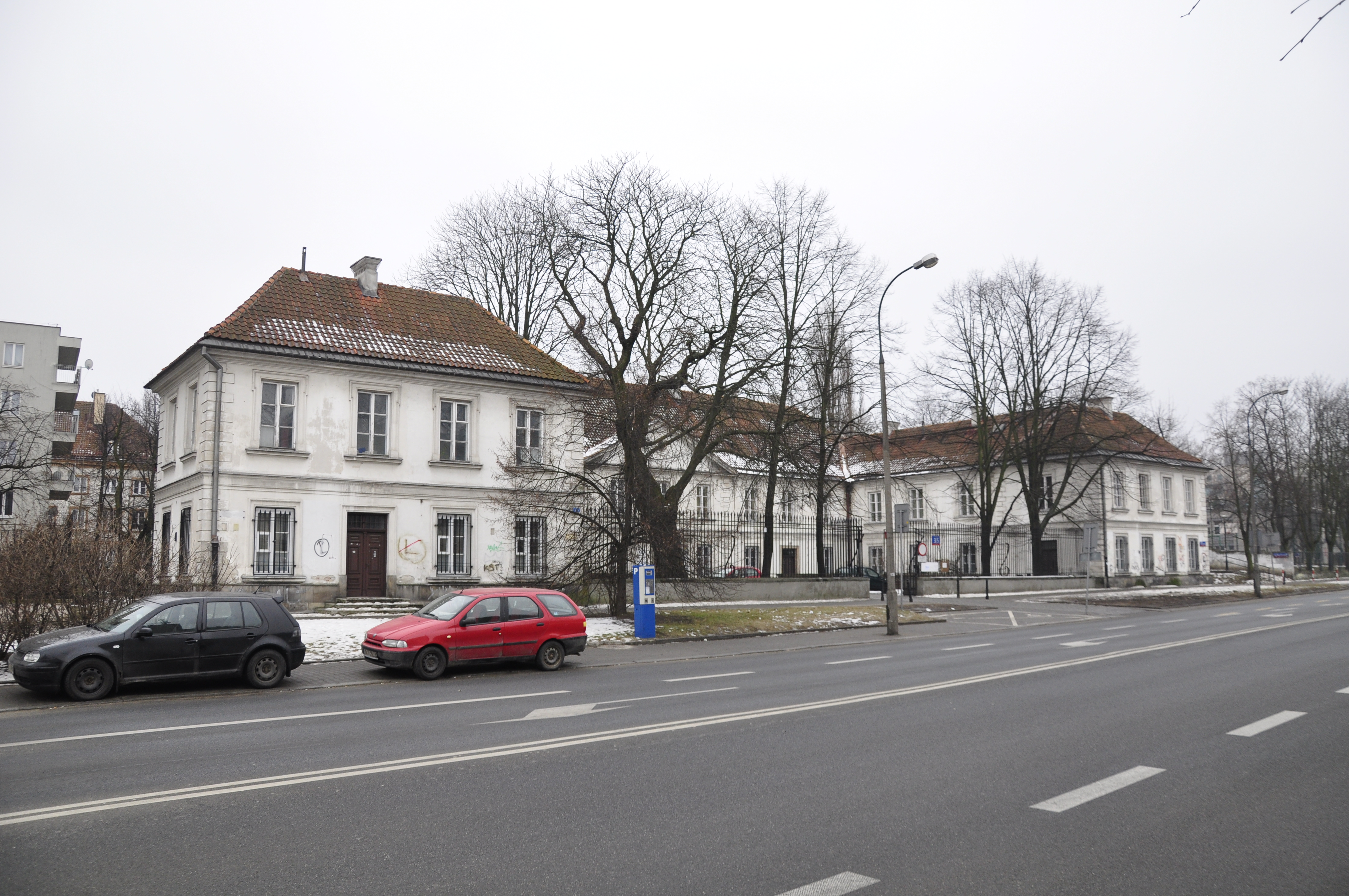 Warschauer Neustadt, Pałac Sierakowskiego, Sierakowski-Palast, auch Sierakowski oder Konwiktorski-Kaserne, heute: Konwiktorska-Strasse 3/5